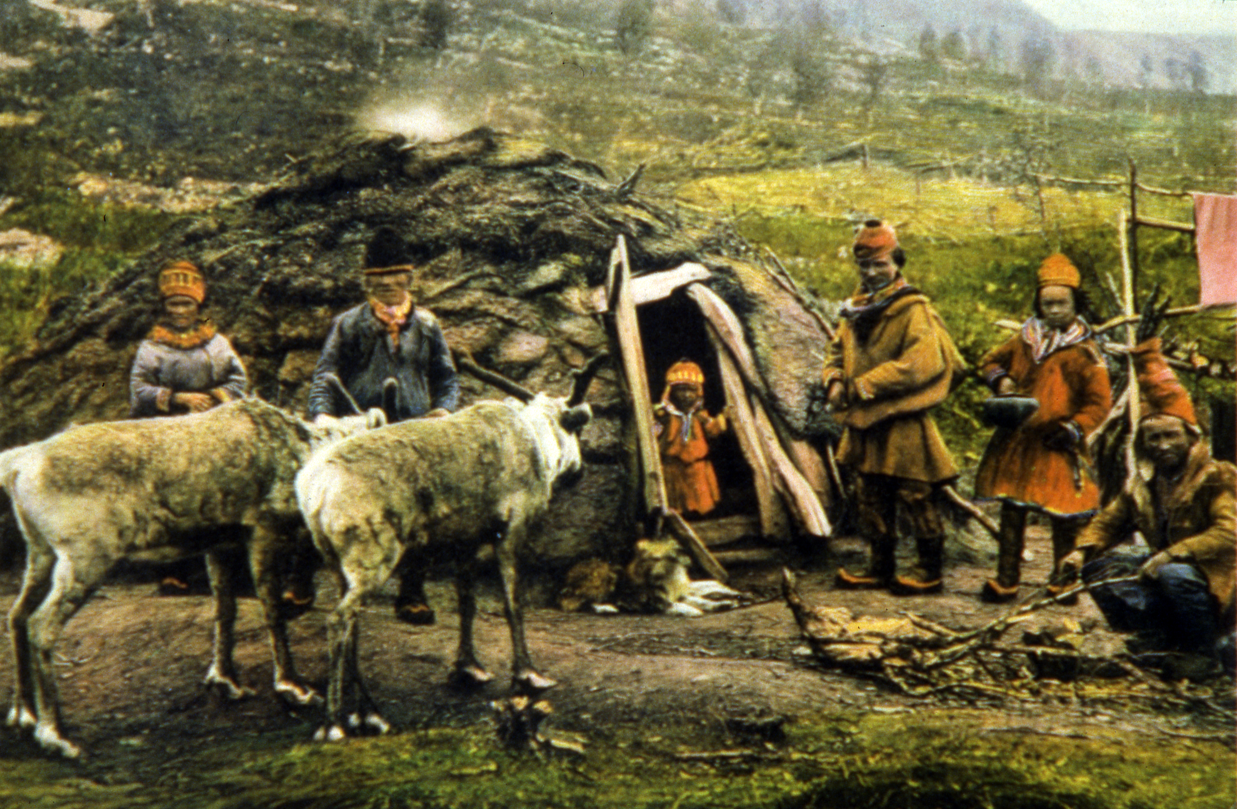 Eldre postkort med samer Tittel / Title: Dato / Date: Fotograf / Photographer: Ukjent/Unknown Utgiver / Publisher: Sted / Place: Eier / Owner Institution: Arkiv i Nordland Lenke / Link: Arkiv i Nordland Arkivreferanse /Archive reference: AIN.NA143.0394 Fra Dag Skogheims Privatarkiv